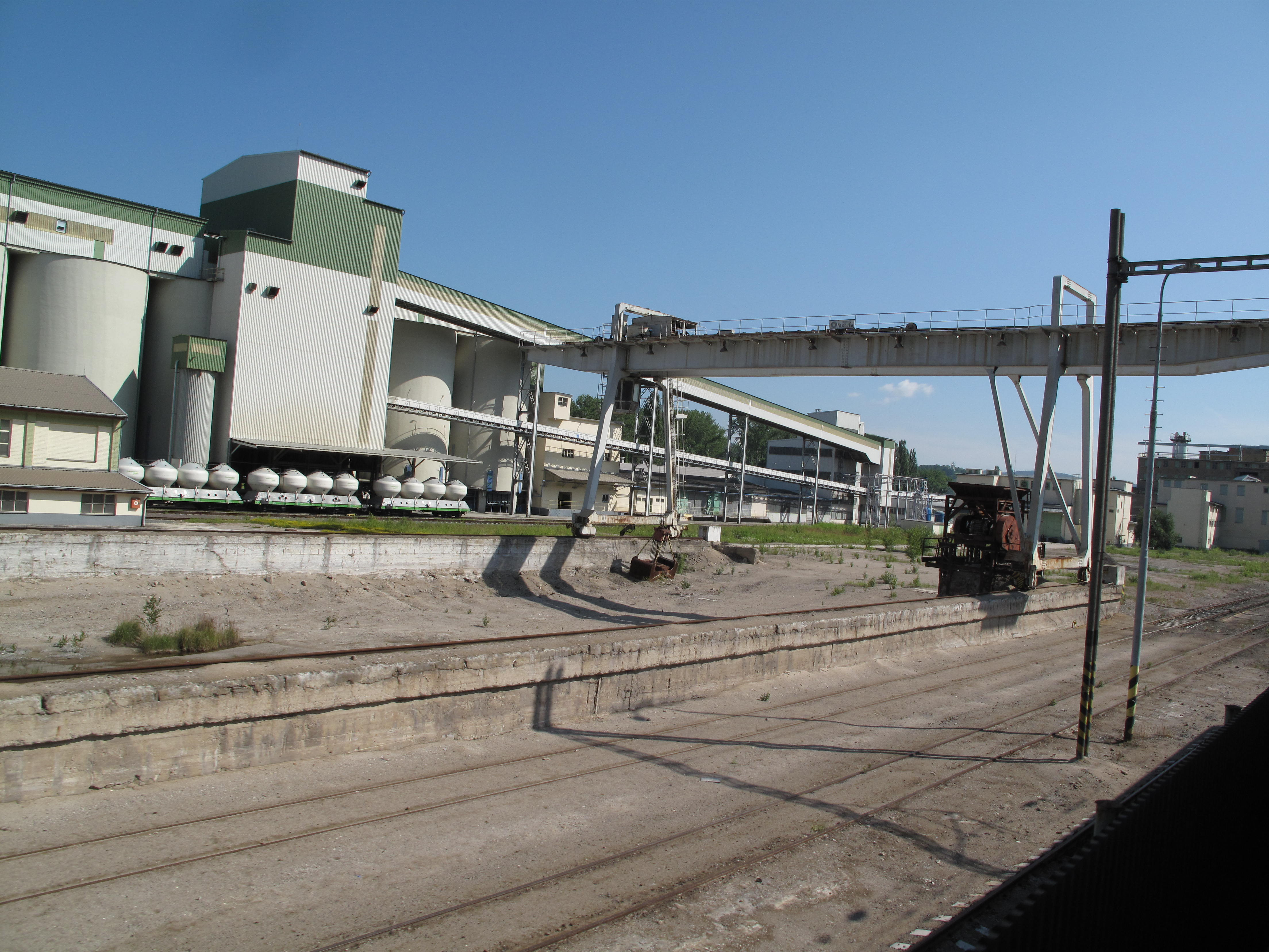 Králův Dvůr, cementárna Českomoravský cement, výhled z trati 170.